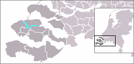 fra wiki der følgende tekst er satt av bruker:Quistnix 18 jul 2004 13:31 . . Quistnix (Overleg) . . 270x130 (10217 bytes) (Kaart van het Veerse Meer, gemaakt uit sjabloon van Wikipedia-gebruiker Mtcv) Oversatt: Kart over Veerse Meer, laget av mal av Wikipedia-bruker Mtcv. Eget arbeide, kan brukes fritt (GNU/FDL)